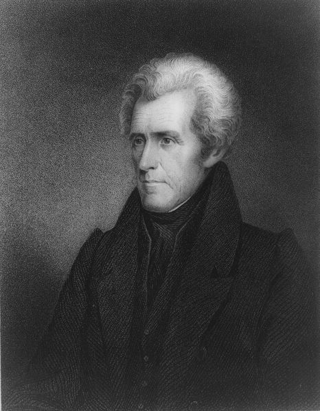 US-Präsident Andrew Jackson